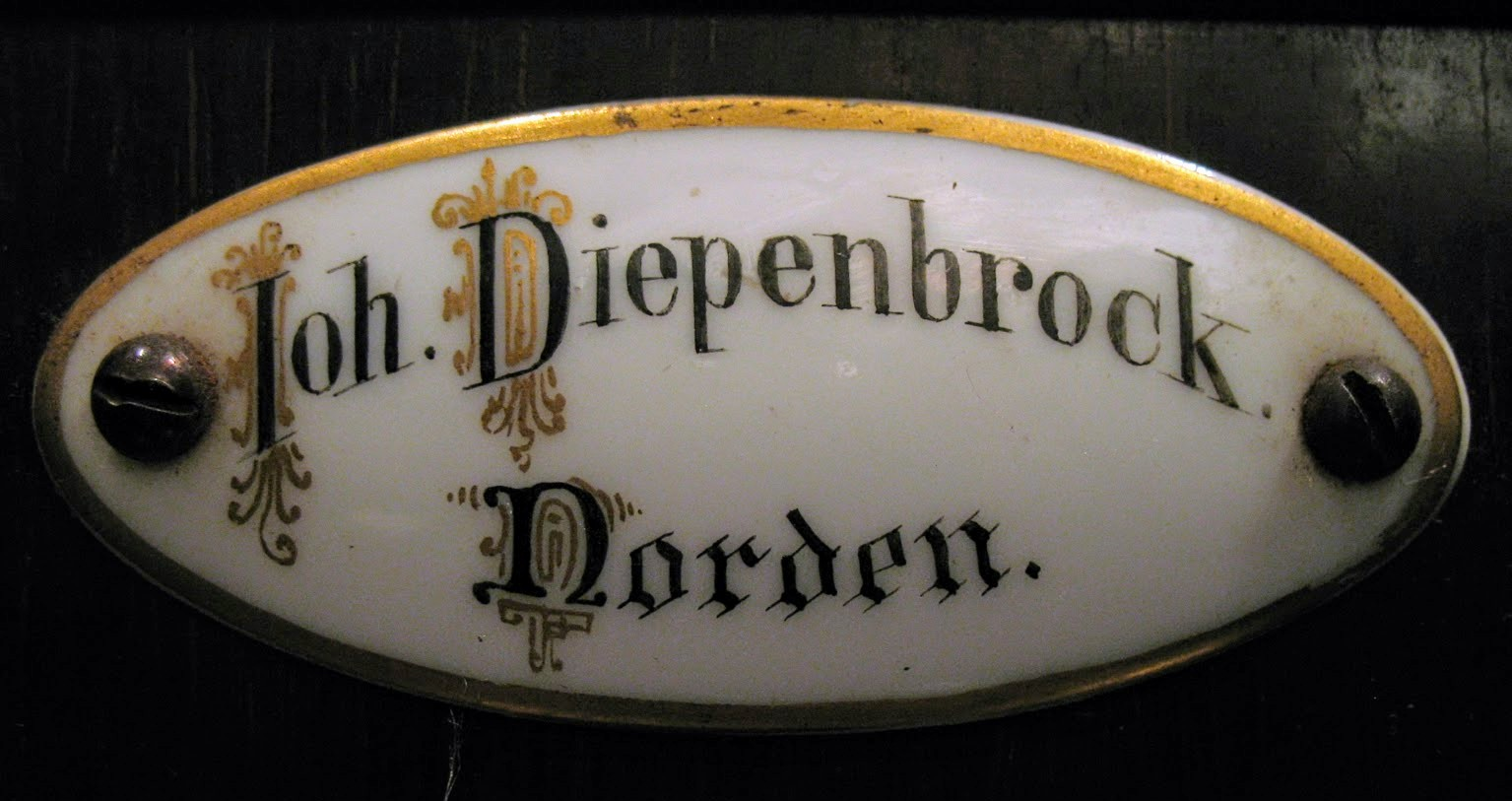 Firmenschild auf Druckwind-Harmonium von Johann Diepenbrock, Norden, Ostfriesland, Niedersachsen, Deutschland